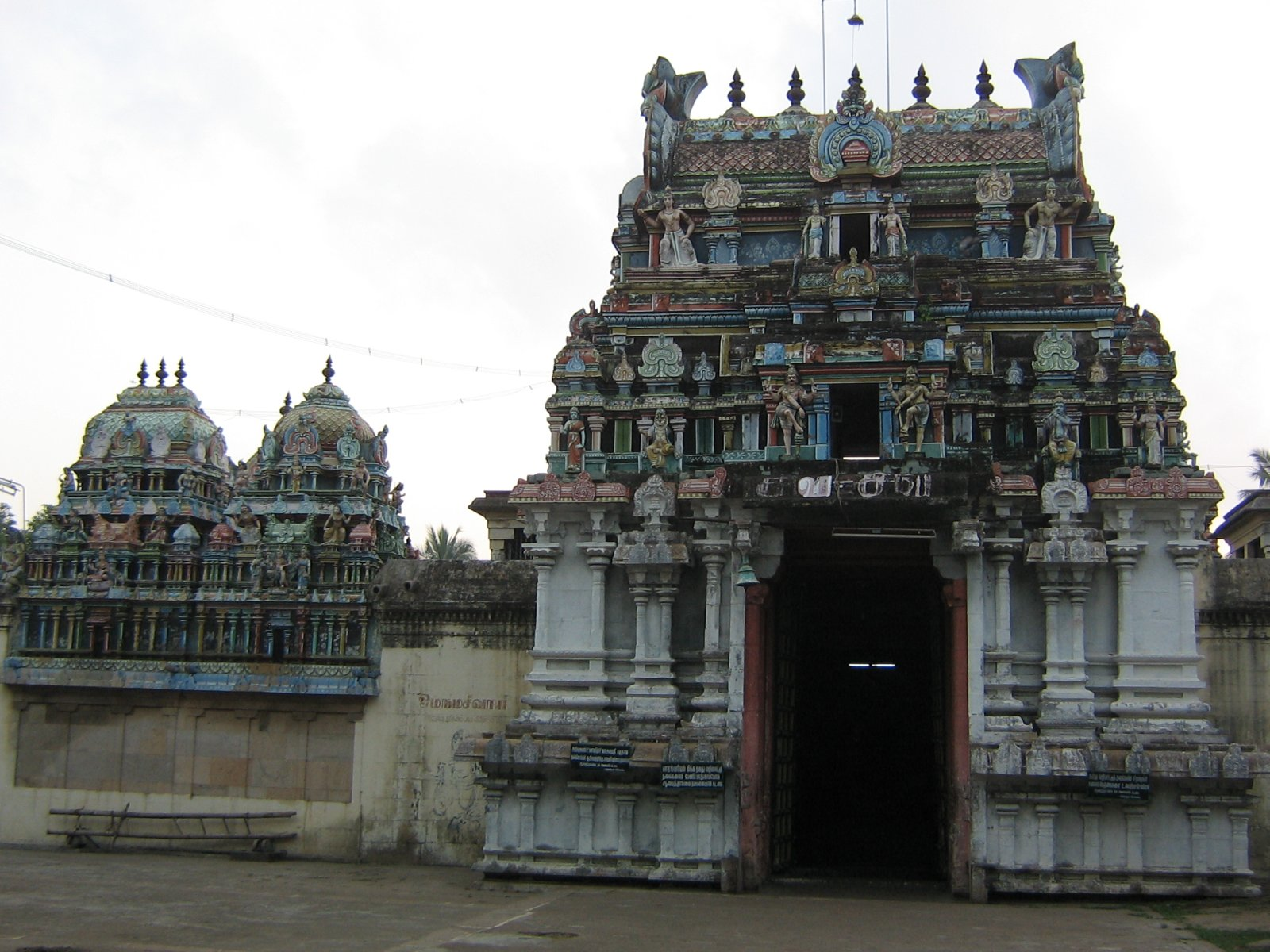 Piravimarundeesar temple at Thiruthuraipoondi, Tamil Nadu, India.